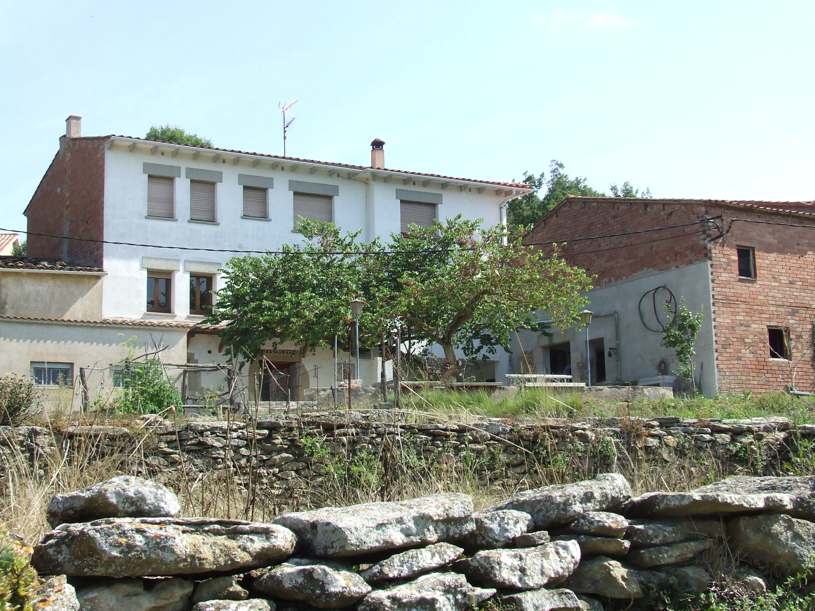 Cal Cinto (Castellcir, Moianès)